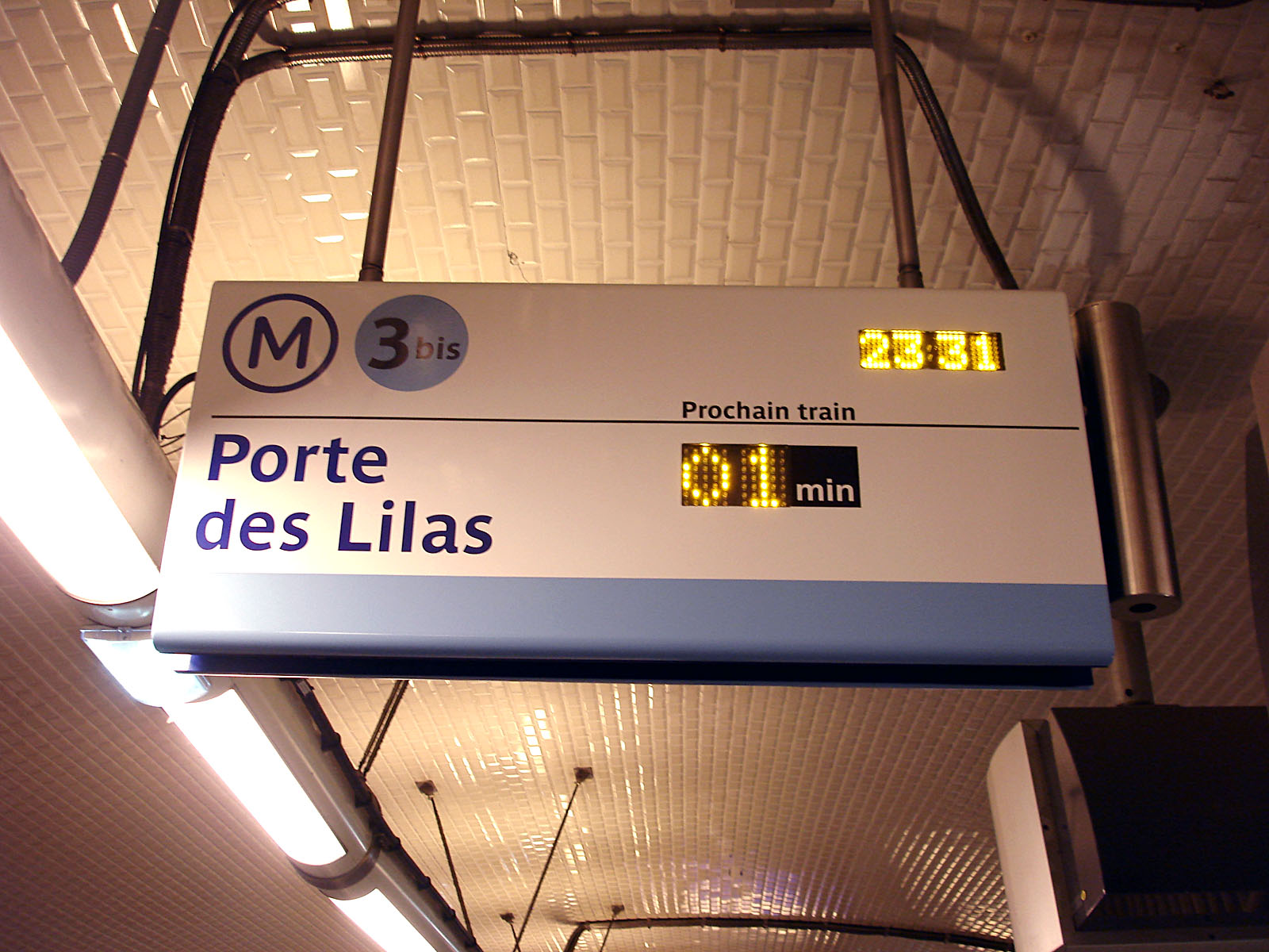 Panneau SIEL à la station Gambetta de la ligne 3 bis du métro de Paris, France.